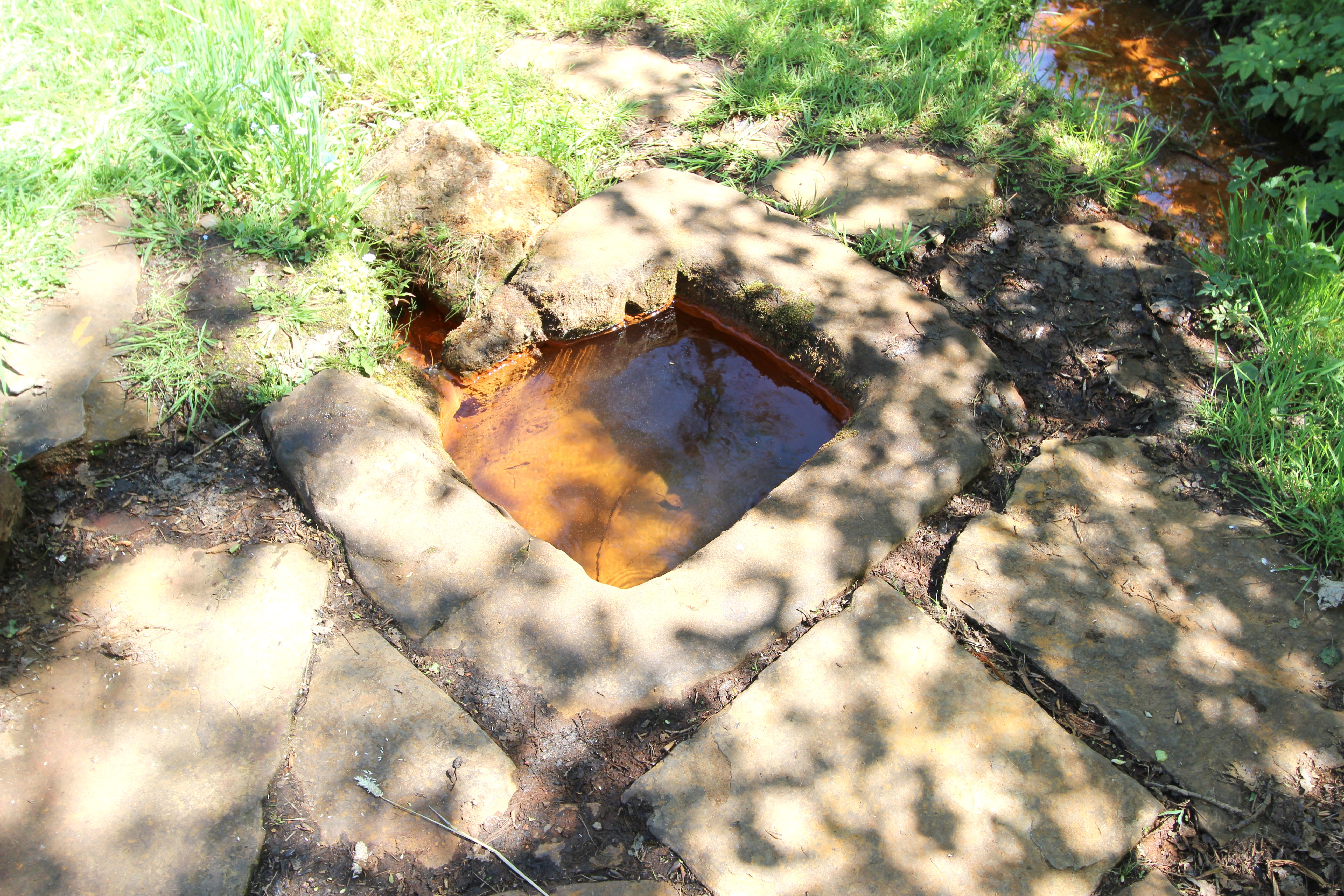 54597 Steffeln; südlich von Steffeln, an der Landstraße 24 zwischen Steffeln und Duppach. Die natürliche Mineralquelle ist ca. 300m westlich vom Eichholzmaar fußläufig erreichbar. Aufnahme von 2017.